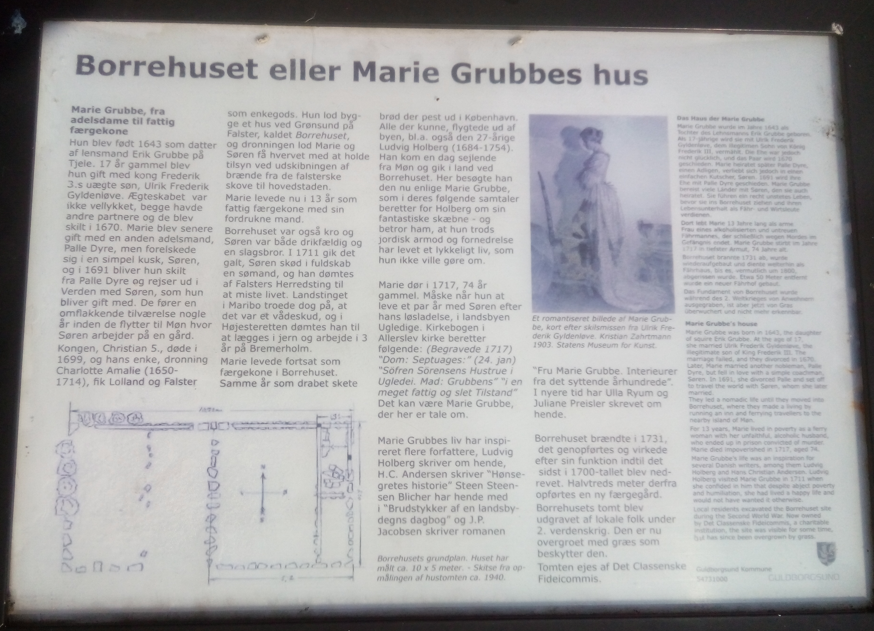 Informationstavle ved mindestenen for Borrehuset, hvori Marie Grubbe levede. Fotoet er taget 9 aug. 2020. Koordinater: 54°53'09.9"N 12°07'07.3"E - 54.886089, 12.118694.